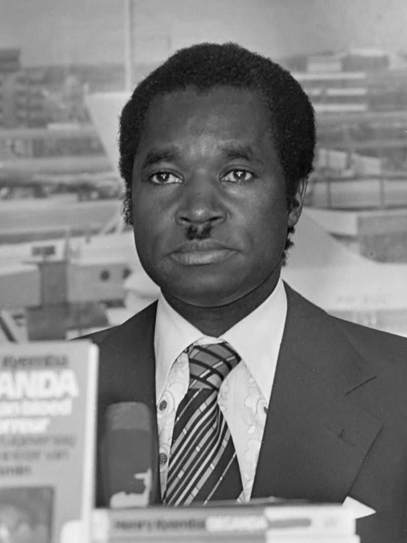 Persconferentie Schiphol van vroegere minister kabinet Amin, Herny Kyemba in verband met zijn boek "Oeganda, staat van bloed en terreur" 4 oktober 1977